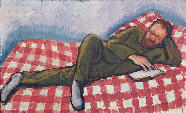 Henri Matisse